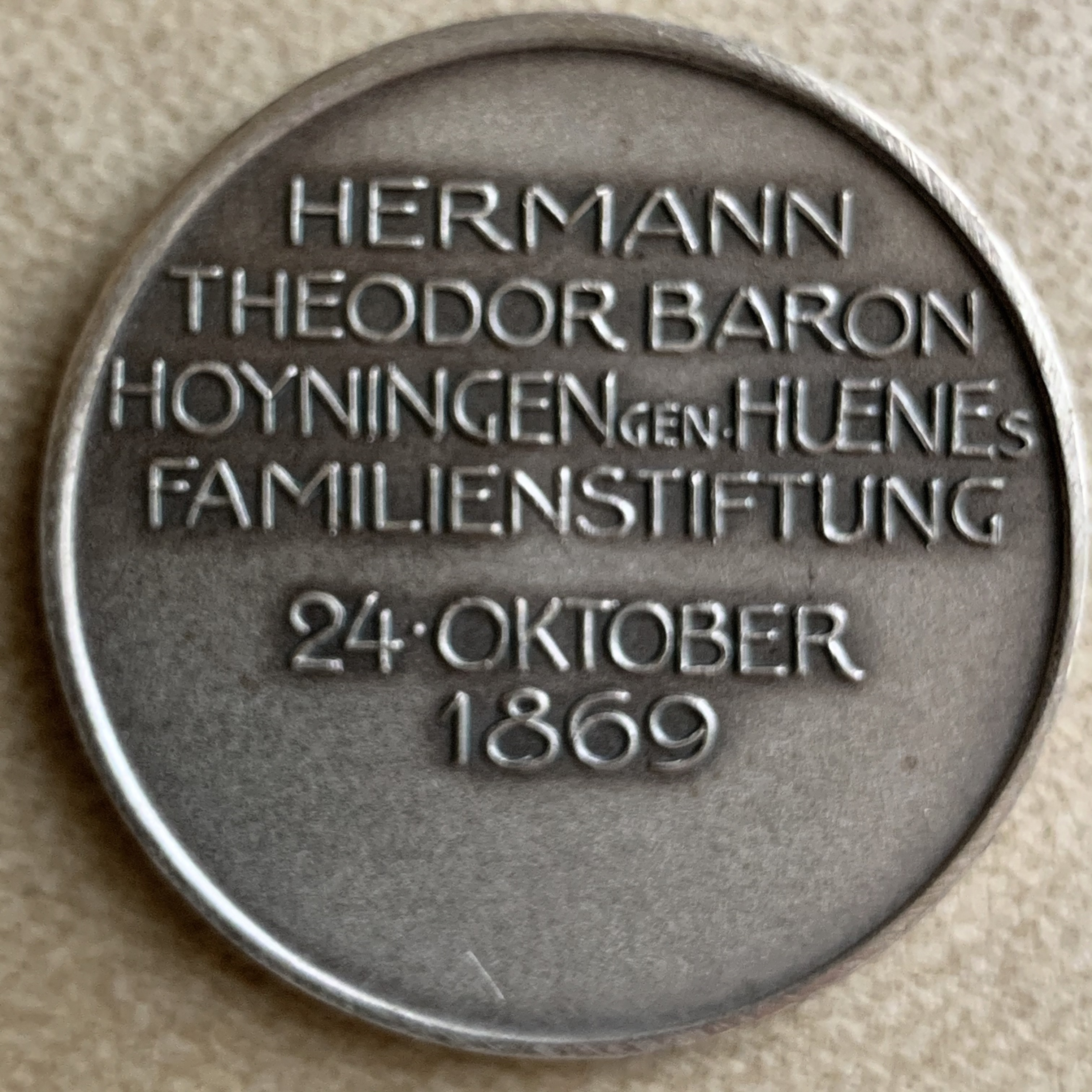 Gedenkmünze von Huene gen. Hoyningen